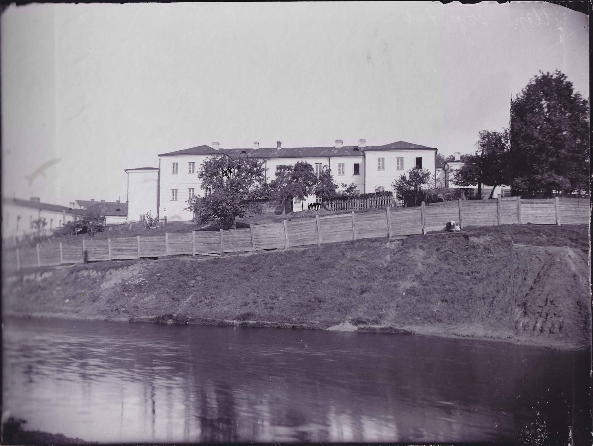 Беларуская (тарашкевіца): Менск (Miensk), рака Сьвіслач (Śvisłač) і Траецкая гара (Trajeckaja hara). Манастыр Сьвятой Тройцы